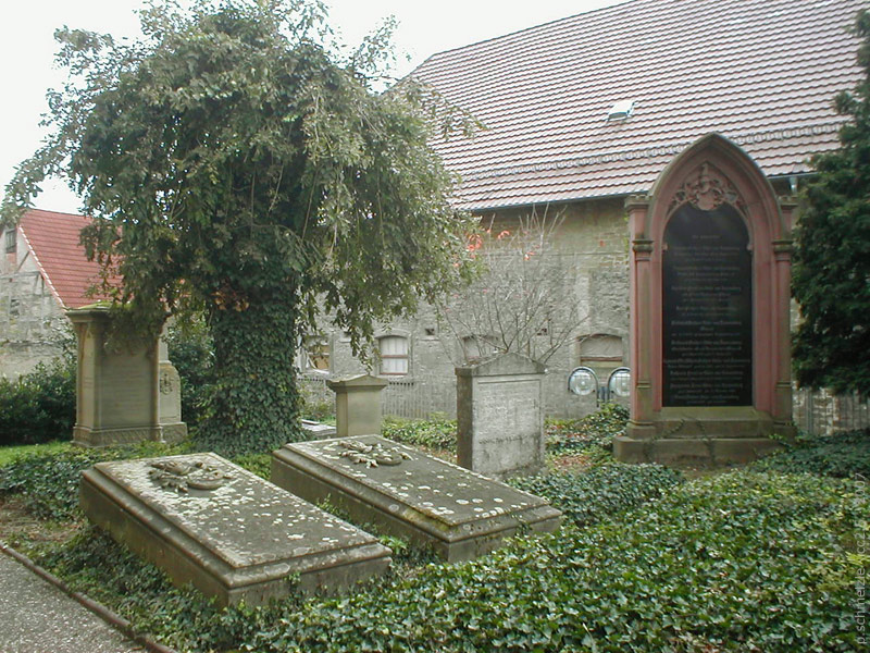 Grablege der Freiherren Göler von Ravensburg bei der evang. Kirche in Sulzfeld (Baden), Baden-Württemberg, Deutschland